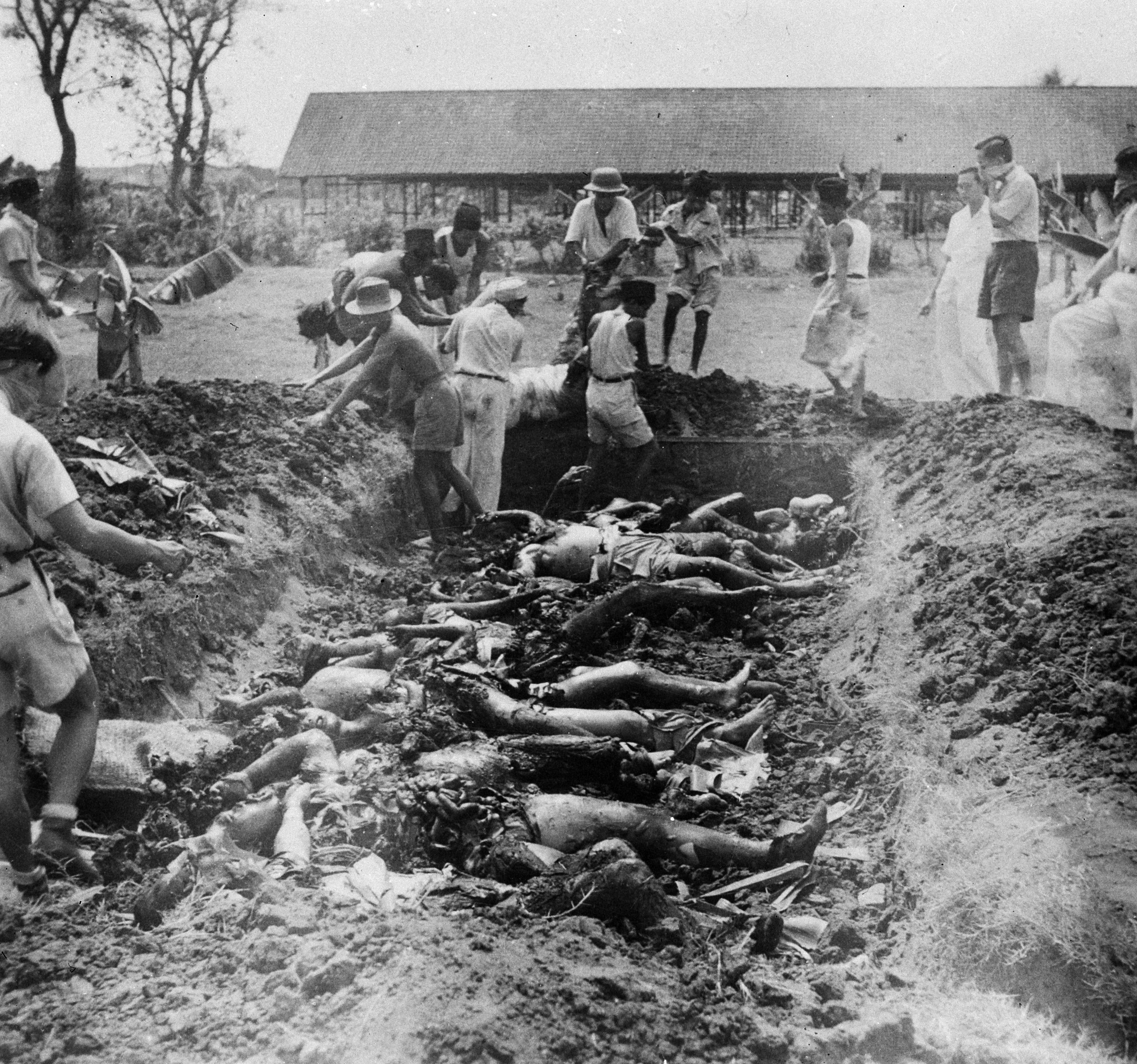 Collectie / Archief : Fotocollectie Dienst voor Legercontacten Indonesië Reportage / Serie : [DLC} Verbrande Chinezen / Malang Beschrijving : Lijken van vermoorde Chinezen in een massagraf Datum : juli 1947 Locatie : Indonesië, Malang, Nederlands-Indië Fotograaf : Fotograaf Onbekend / DLC Auteursrechthebbende : Nationaal Archief Materiaalsoort : Negatief (zwart/wit) Nummer archiefinventaris : bekijk toegang 2.24.04.03 Bestanddeelnummer : 11756